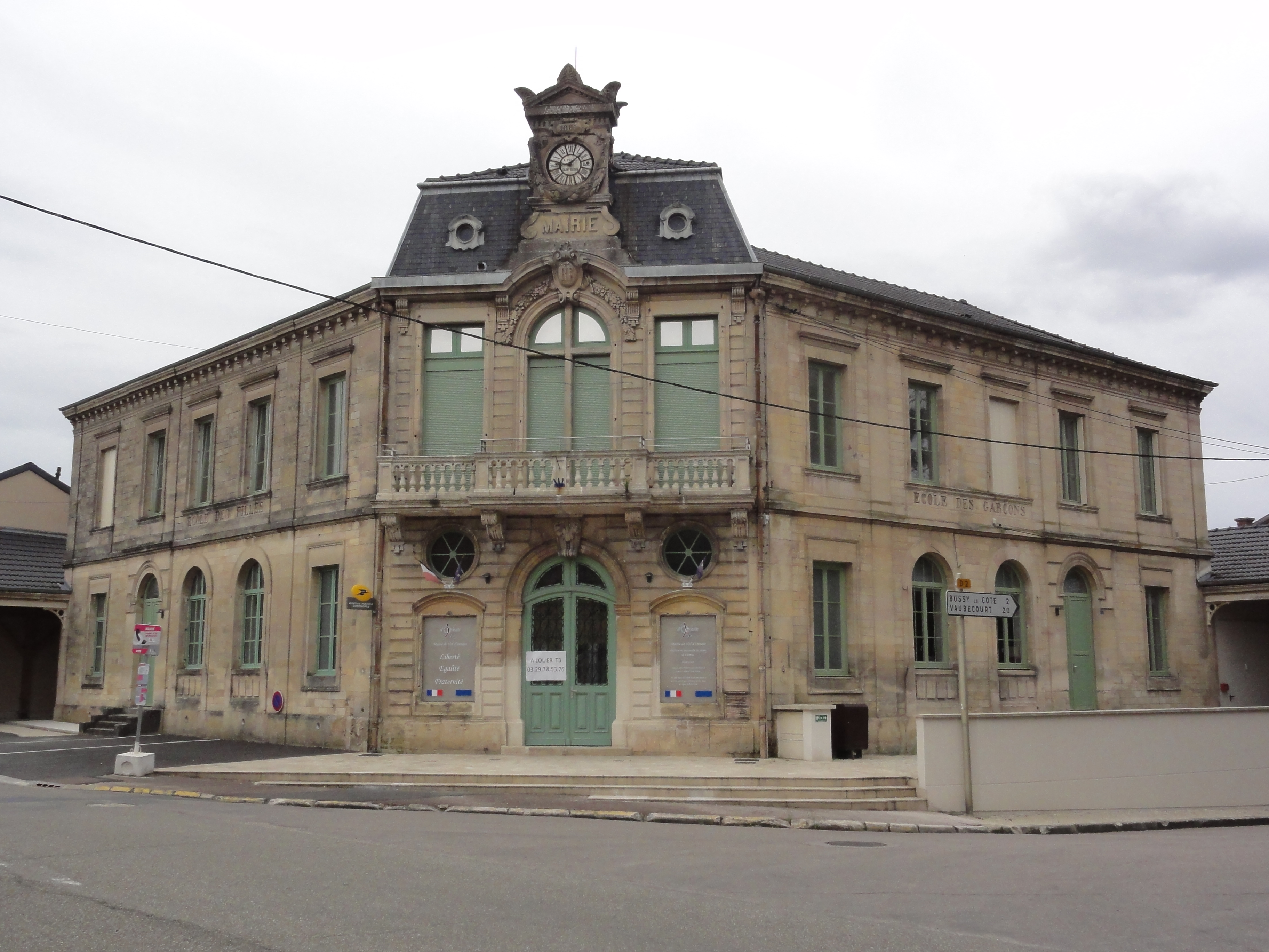 Val-d'Ornain (Meuse) Mussey, mairie - écoles